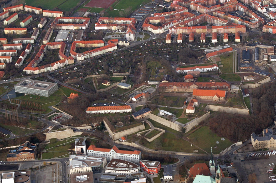 Luftbild aus Richtung Süden von der Zitadelle Petersberg in Erfurt